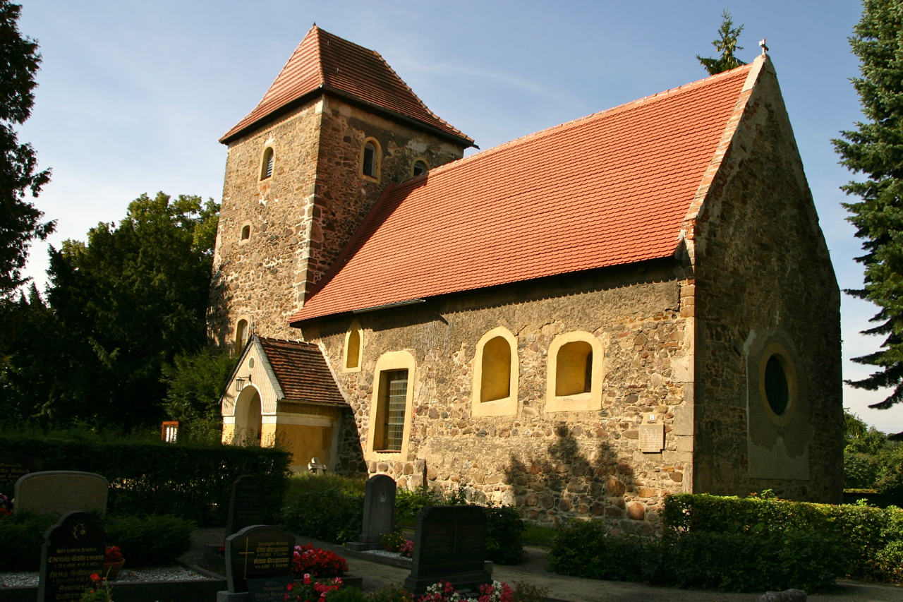 Scheuder ist ein Teil der Stadt Südliches Anhalt in Sachsen-Anhalt.